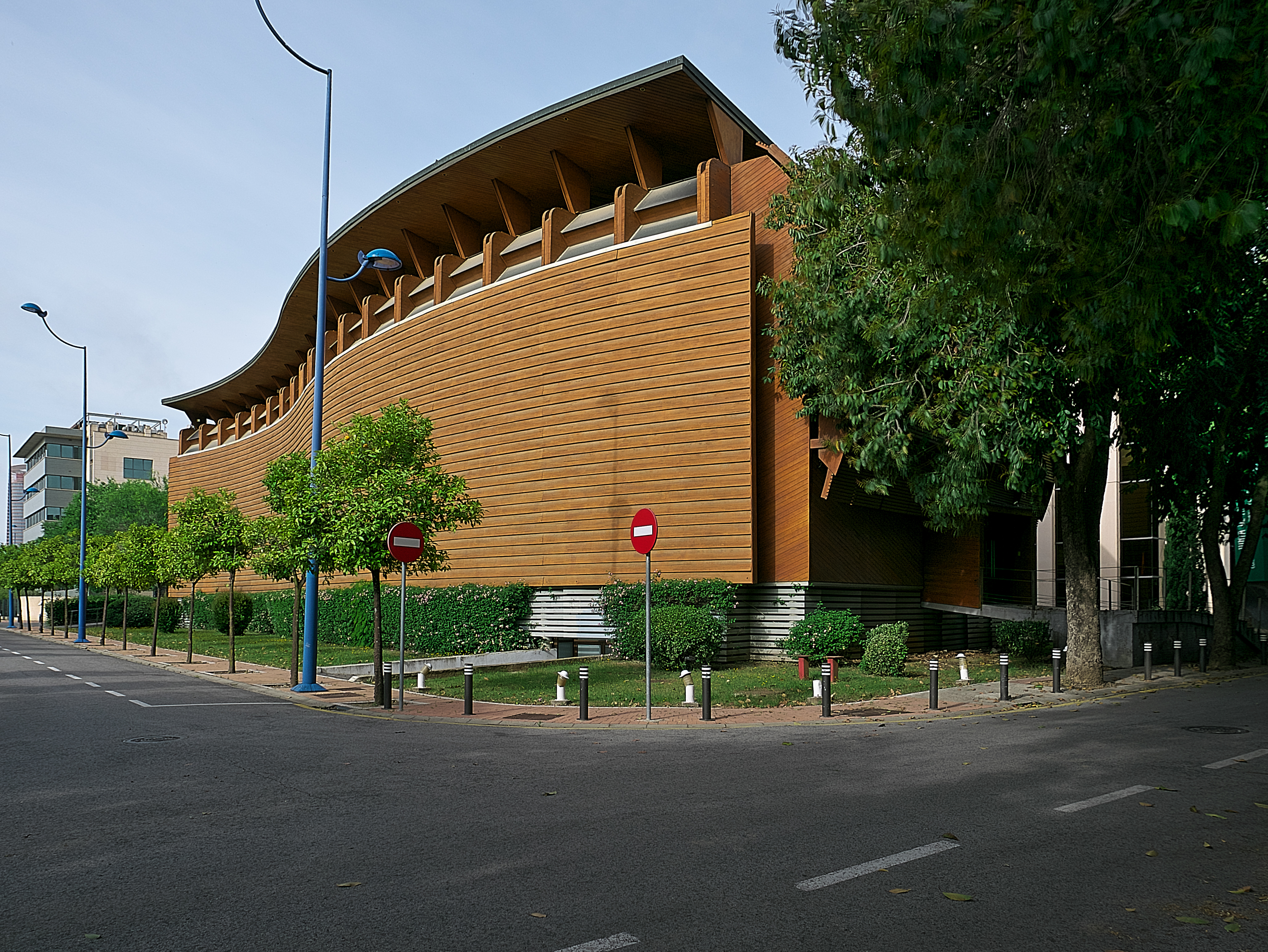 José Cruz Ovalle y Germán del Sol Guzmán proyectan el Pabellón de Chile utilizando el pinus radiata.